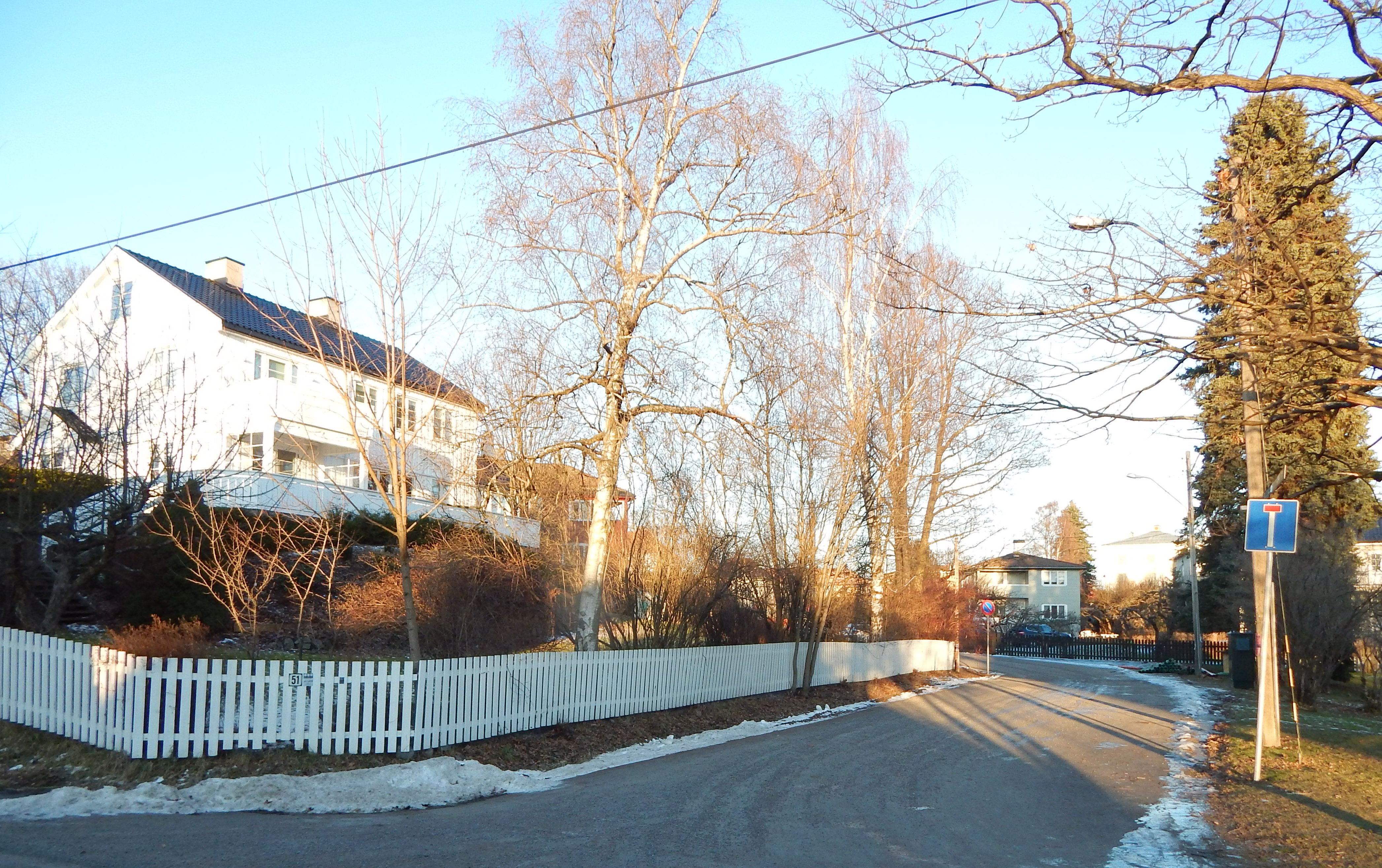 Christopher Hansteens vei sett fra Hasselhaugveien